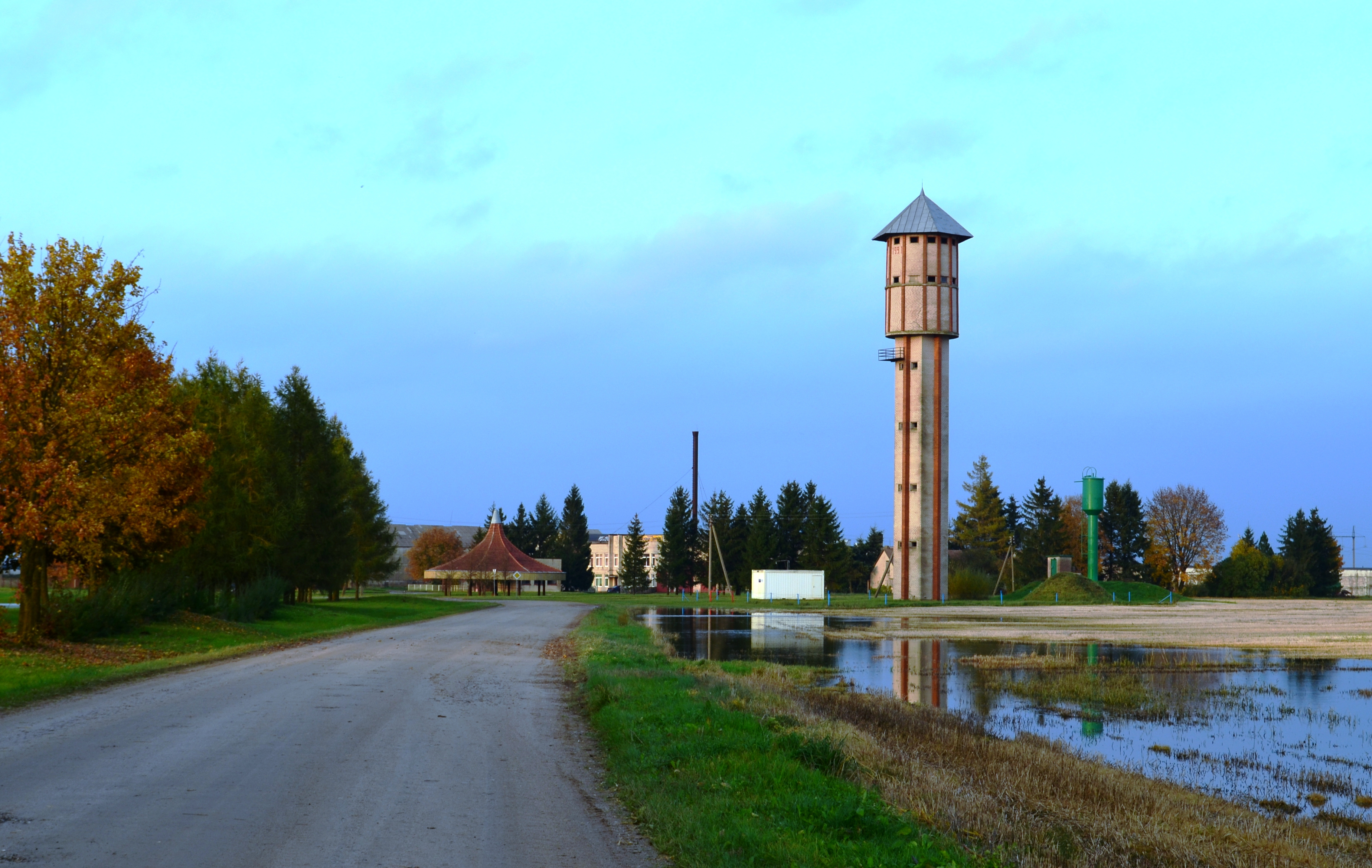 ŽŪB bokštas, Pavermenys, Kėdainių raj.